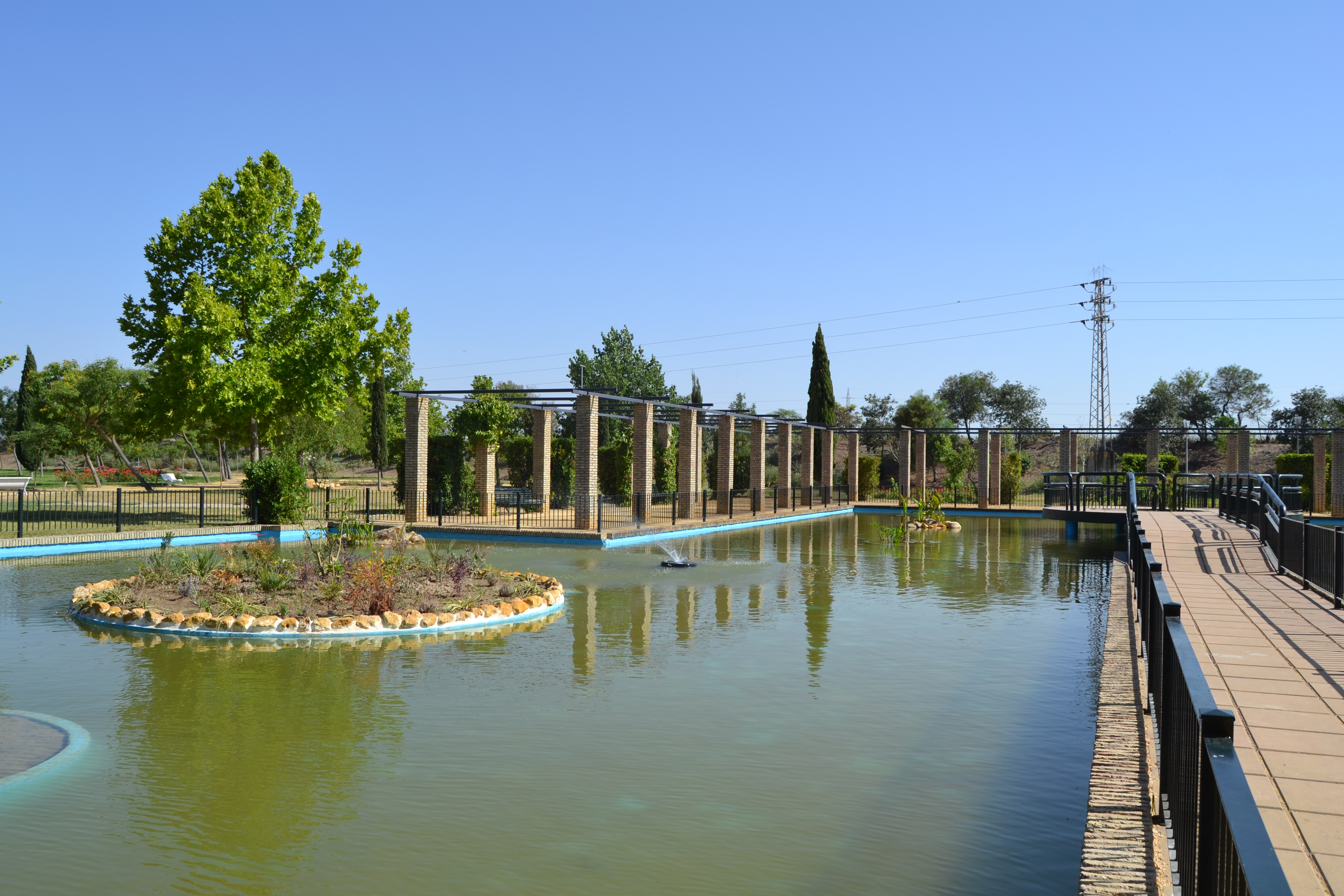 Parque de las Marismas. Los Palacios y Villafranca (Sevilla).